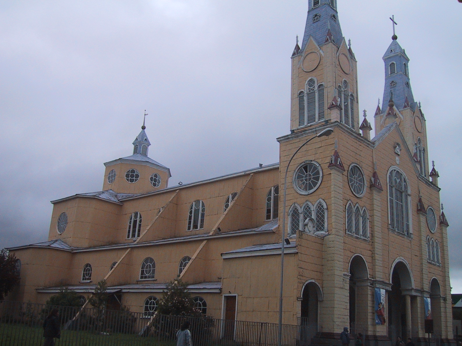 155-5520_IMG.JPG